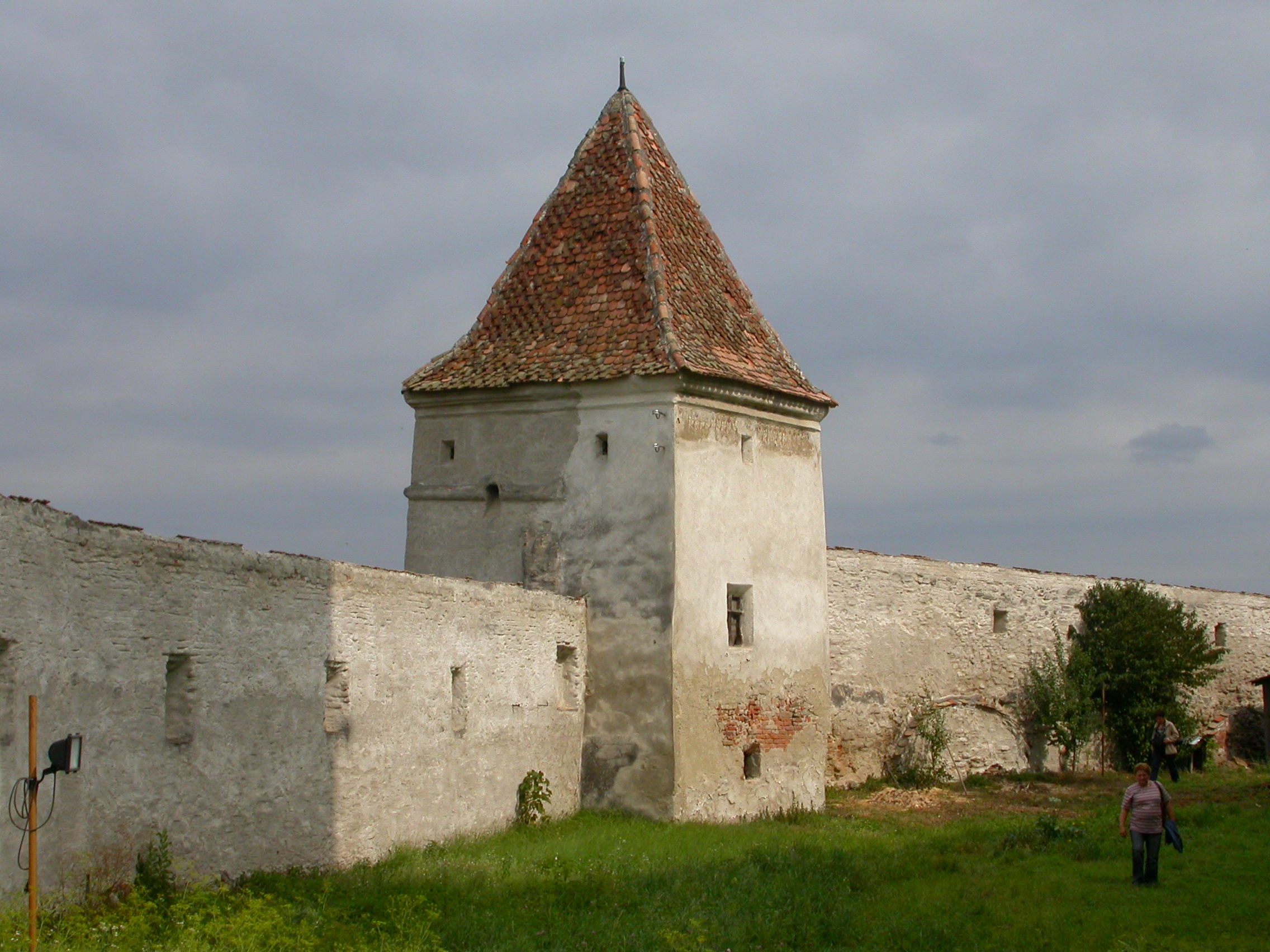 Ansamblul bisericii evanghelice fortificate, sec. XIV - XVIII 02